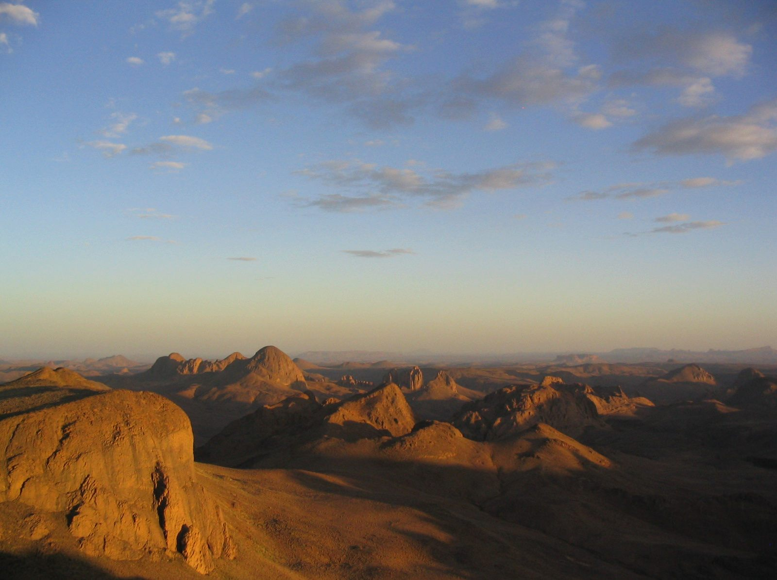 Le Hoggar au coucher du soleil depuis le plateau de l'Assekrem